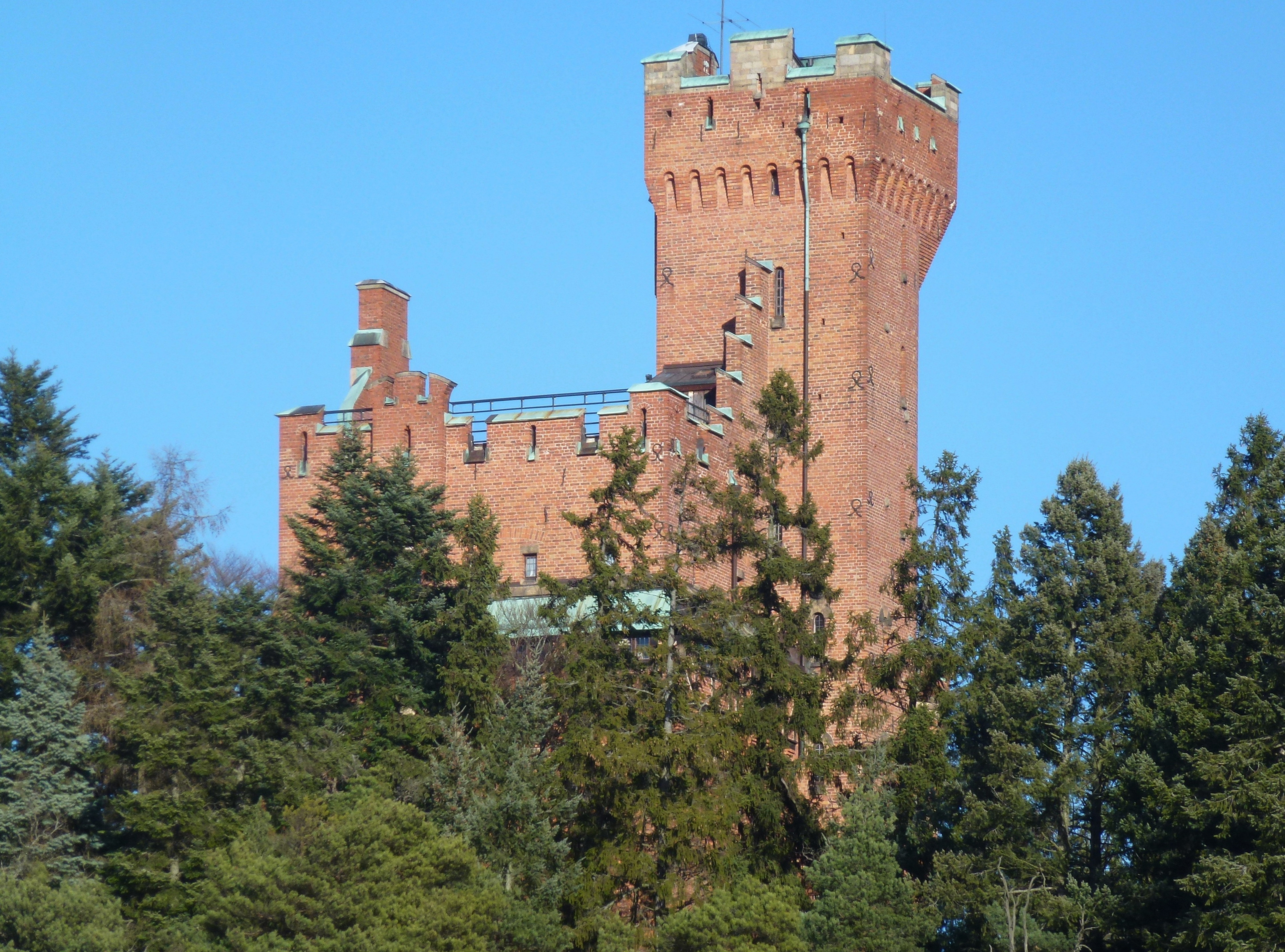 Cedergrenska tornet, sett från Bockholmen